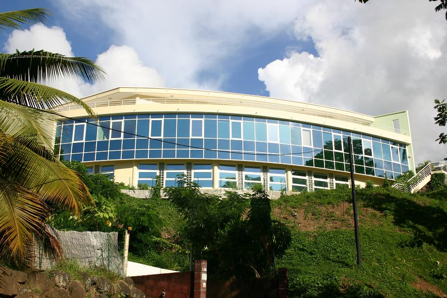 Façade nord du centre de formation de l'enseignement supérieur privé de polynésie française hébergeant notamment l'ISEPP et l'IFEP, campus associé à l'UCO